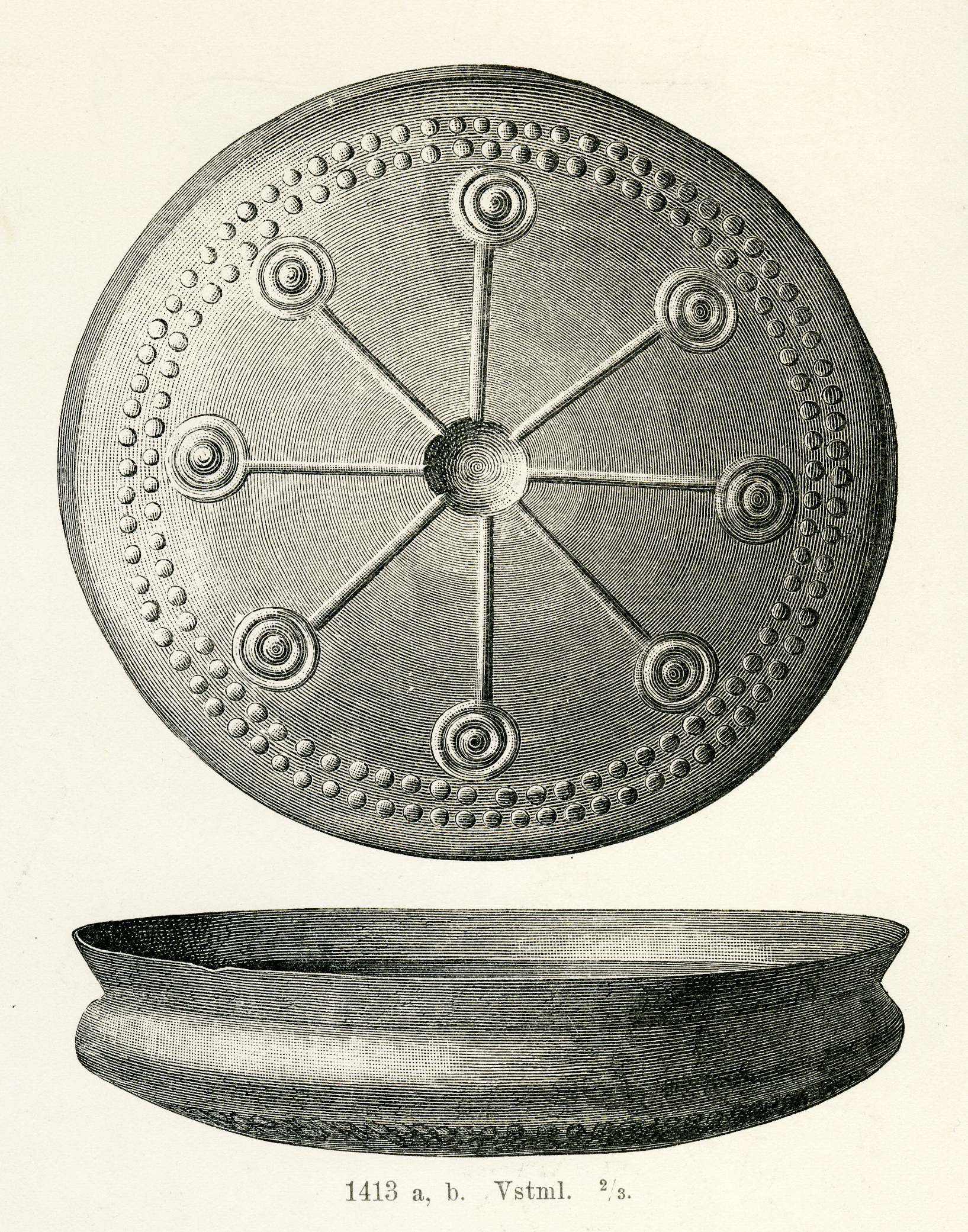 Bältesskål av brons från Badelundaåsen, Hubbo socken, Siende härad, Västerås kommun, Västmanlands län, Västmanland, Sverige. Bältesskålen hittades 1875 tillsammans med några andra bronsföremål av B. Andersson vid järnvägsarbete vid "Hökbacken" på Badelundaåsen. Fyndplatsen har RAÄ-nummer Hubbo 110:1. Fynden inlöstes i augusti 1875 med 50 kr av Statens Historiska Museum och har där inventarienummer SHM 5534. Skålen dateras till bronsålderns period V. Träsnitt ur Minnen från vår forntid: I Stenåldern och bronsåldern (1917) av Oscar Montelius, figur 1413.